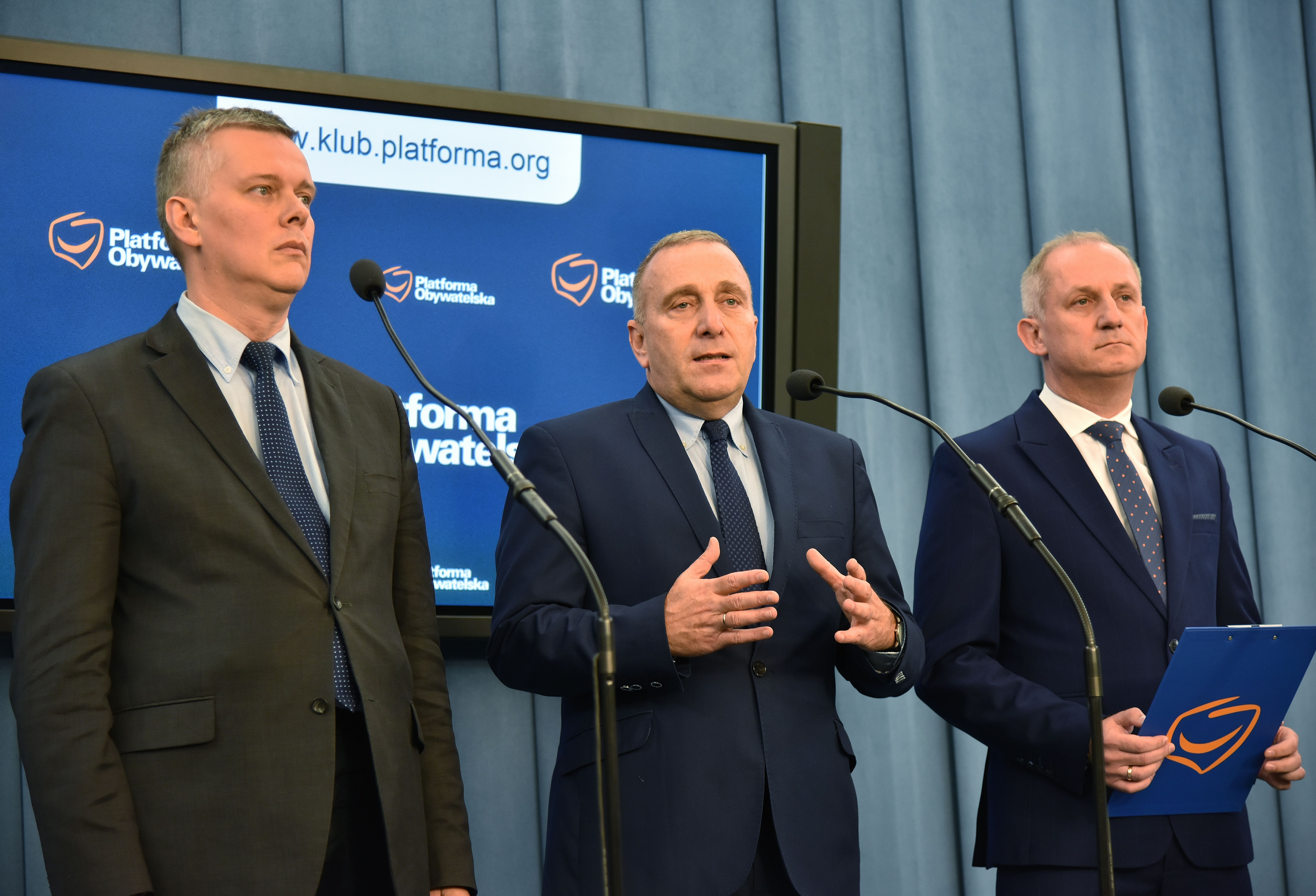 Tomasz Siemoniak, Grzegorz Schetyna i Sławomir Neumann podczas konferencji prasowej w Sejmie